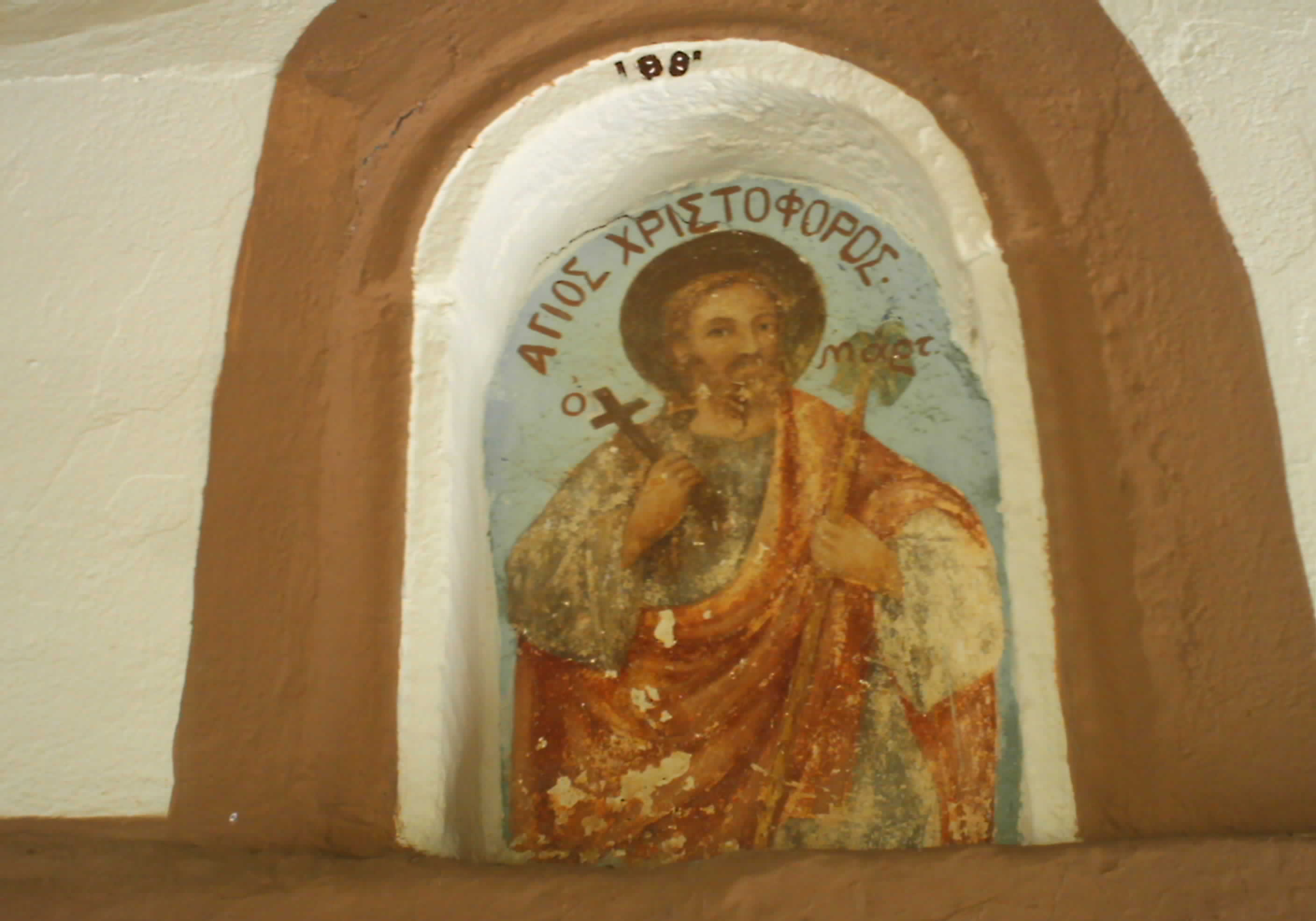 Agios Xristoforos